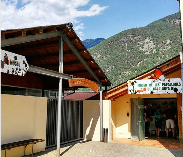 Fassana del Museu de les Papallones de Catalunya a Ribera de Cardos